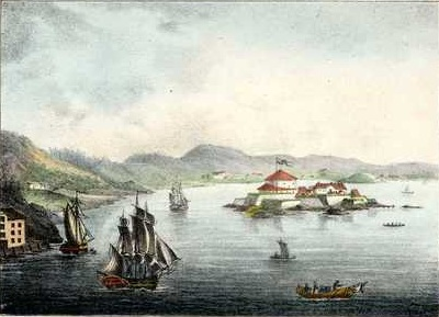 Trondhjemsfjorden med Munkholm festning og båter. Fargelagt litografi av P.F. Wergmann Fra "Norsk Prospekt-Samling" 6. hefte 1835